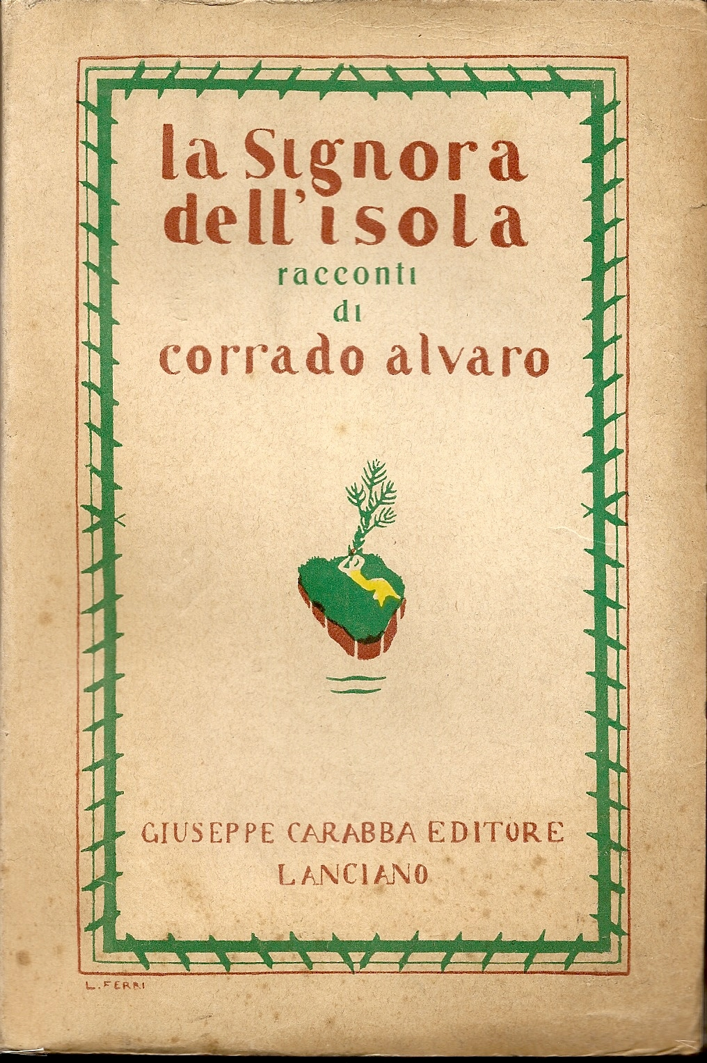 Copertina prima edizione de "La signora dell'isola" di Corrado Alvaro, Lanciano, Carabba, 1930